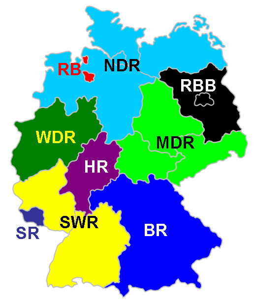 This image was copied from . The original description was: Karte der neun Landesrundfunkanstalten der ARD inkl. deren Logos. Farben der Länder sind dem jeweiligen Logo entnommen.